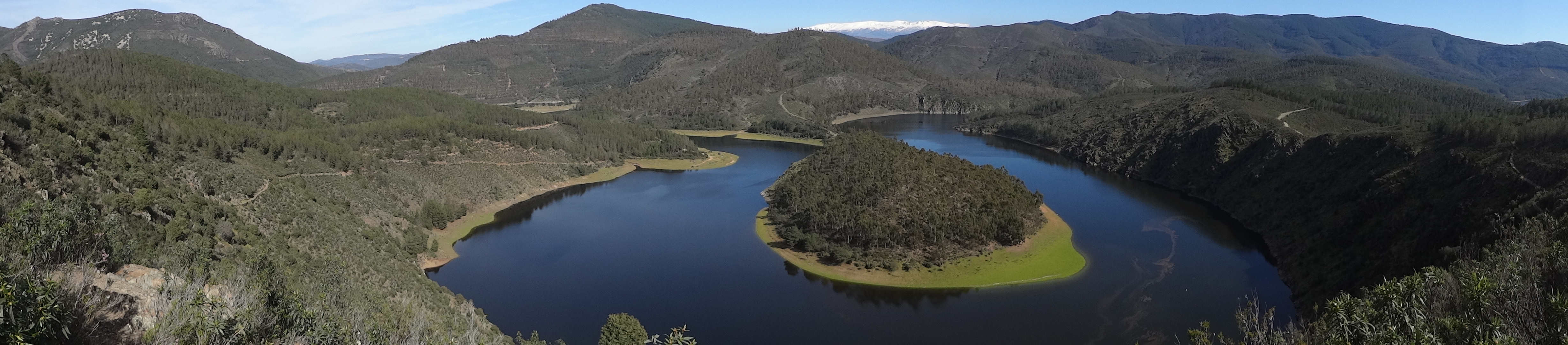 Las Hurdes This is a photography of a Site of Community Importance in Spain with the ID: ES4320011. Natura2000 entry, EEA entry